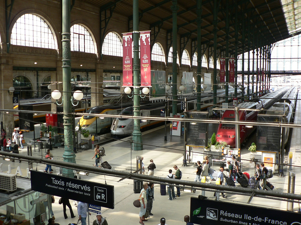 Gare du Nord Paris France départ grandes lignes